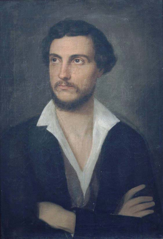 Ritratto di Antonino Gandolfo Brancaleone eseguito da Giuseppe Gandolfo. Fotografia di mia proprietà